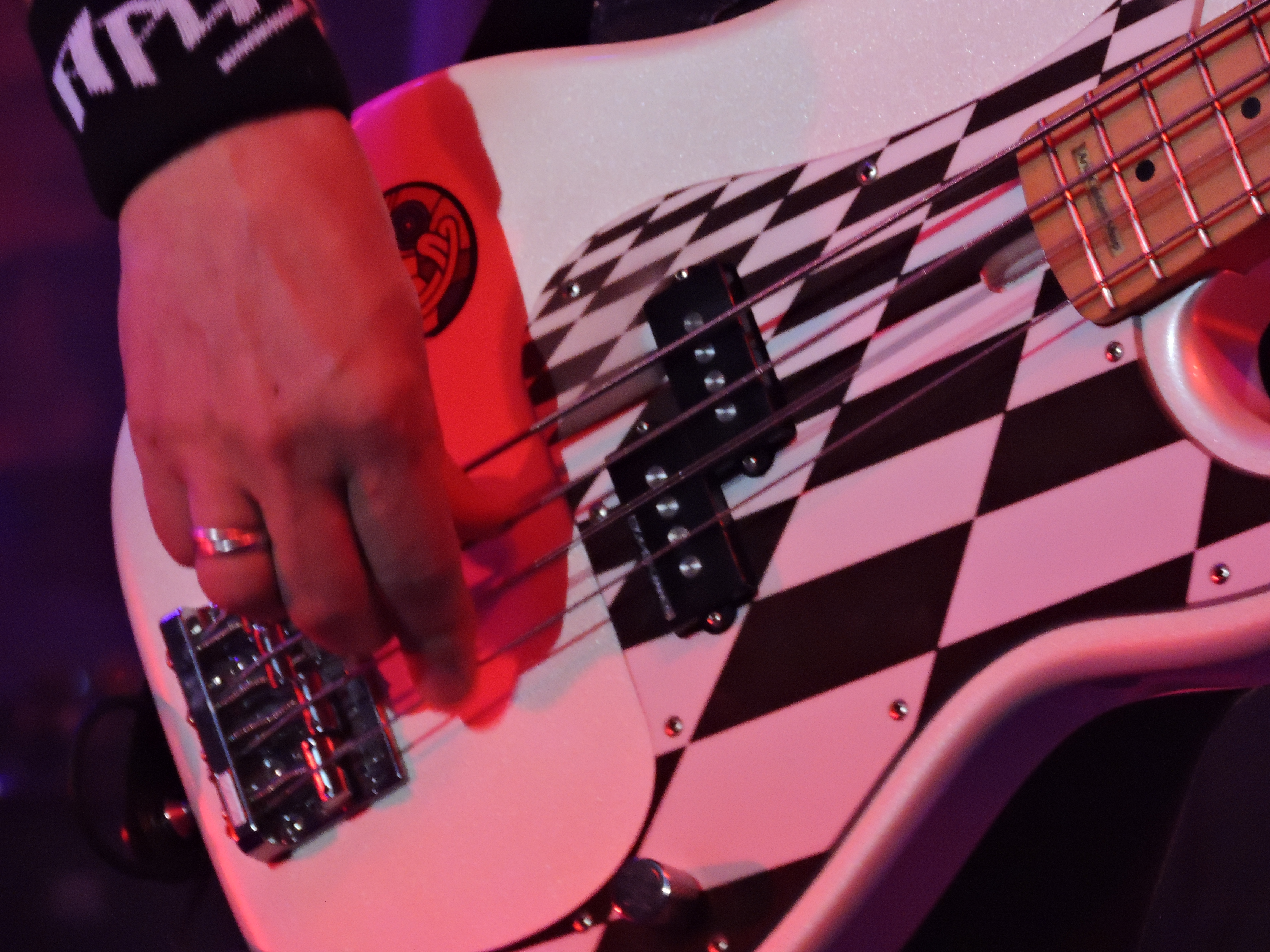 Игра на басухе